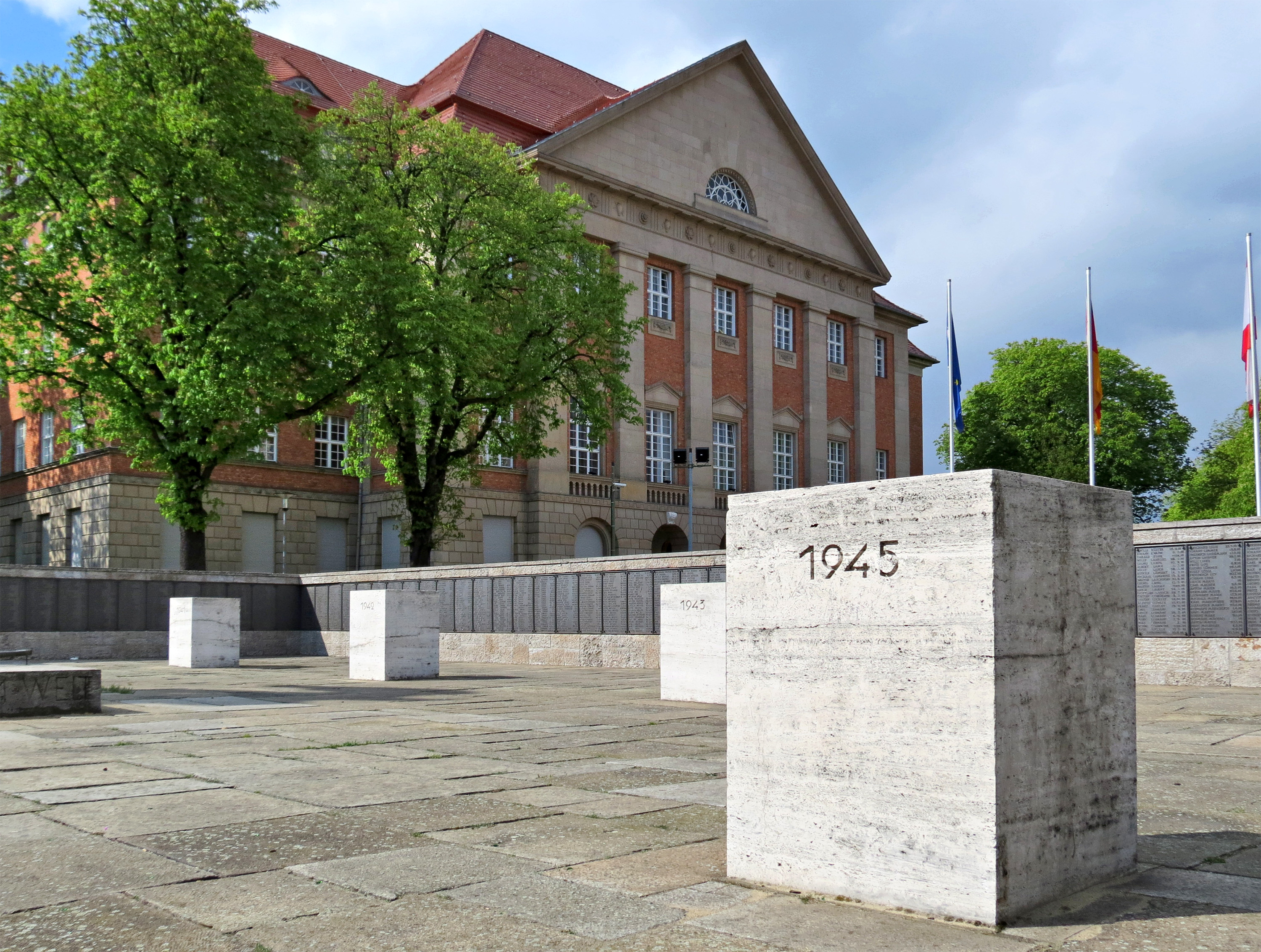 Siemens-Ehrenmal Platz mit Gedenksäule, im Hintergrund das Siemens-Verwaltungsgebäude